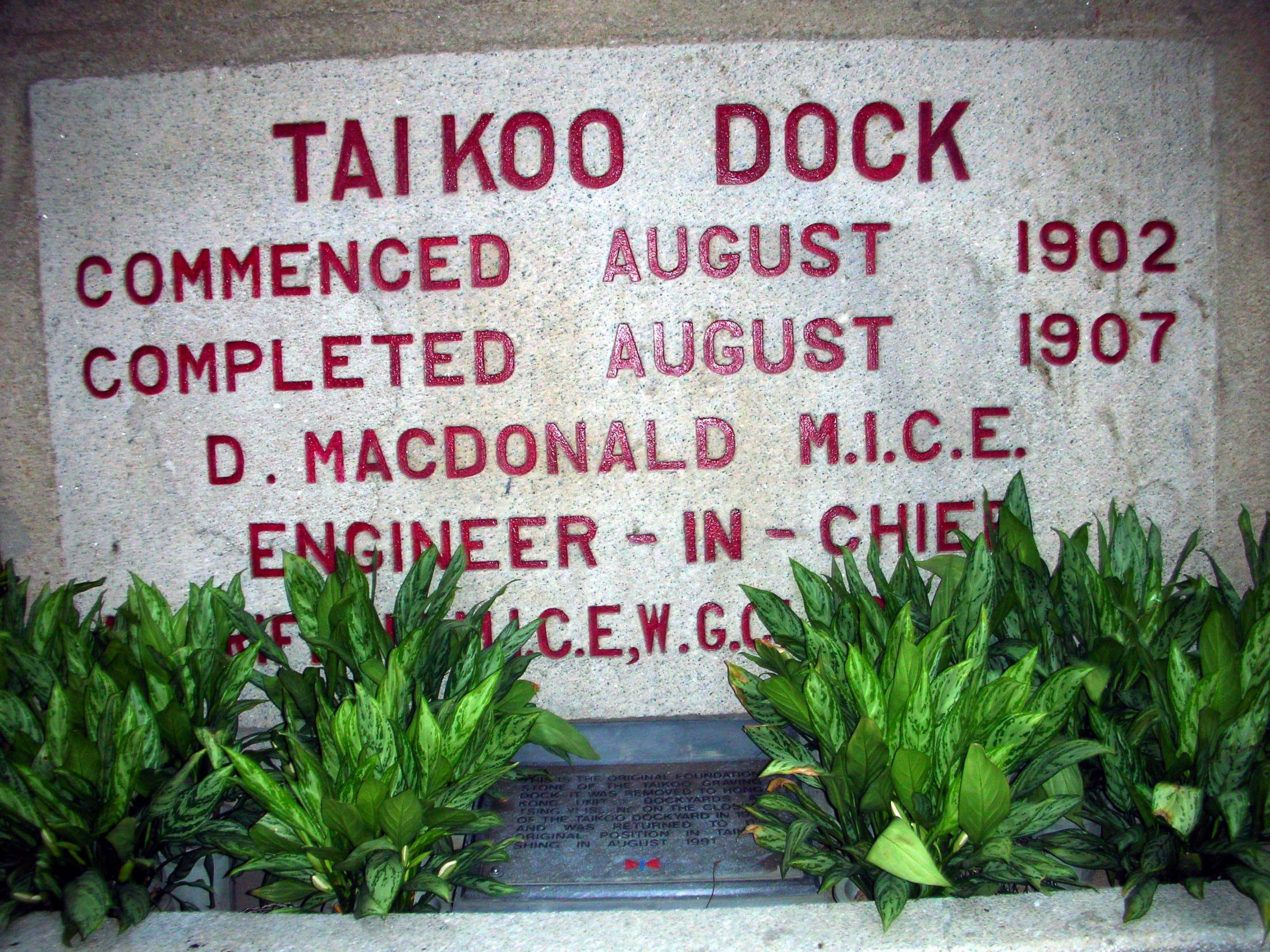 Takoo Dock, Hong Kong 香港太古船塢落成碑記，現存於太古城內。